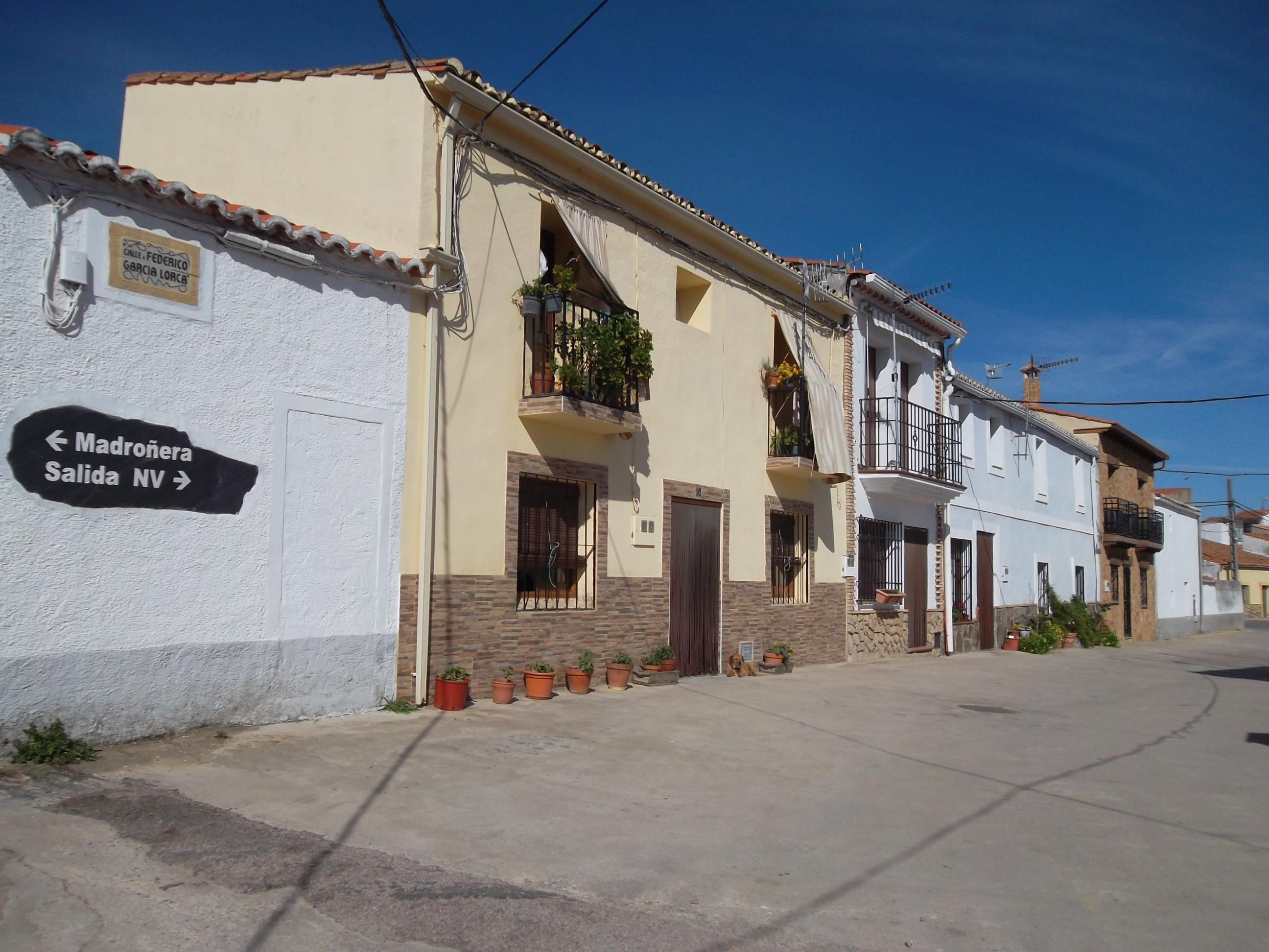 La Calle de Federico García Lorca de Aldeacentenera un pueblecito de la provincia de Cáceres en Extremadura, España.